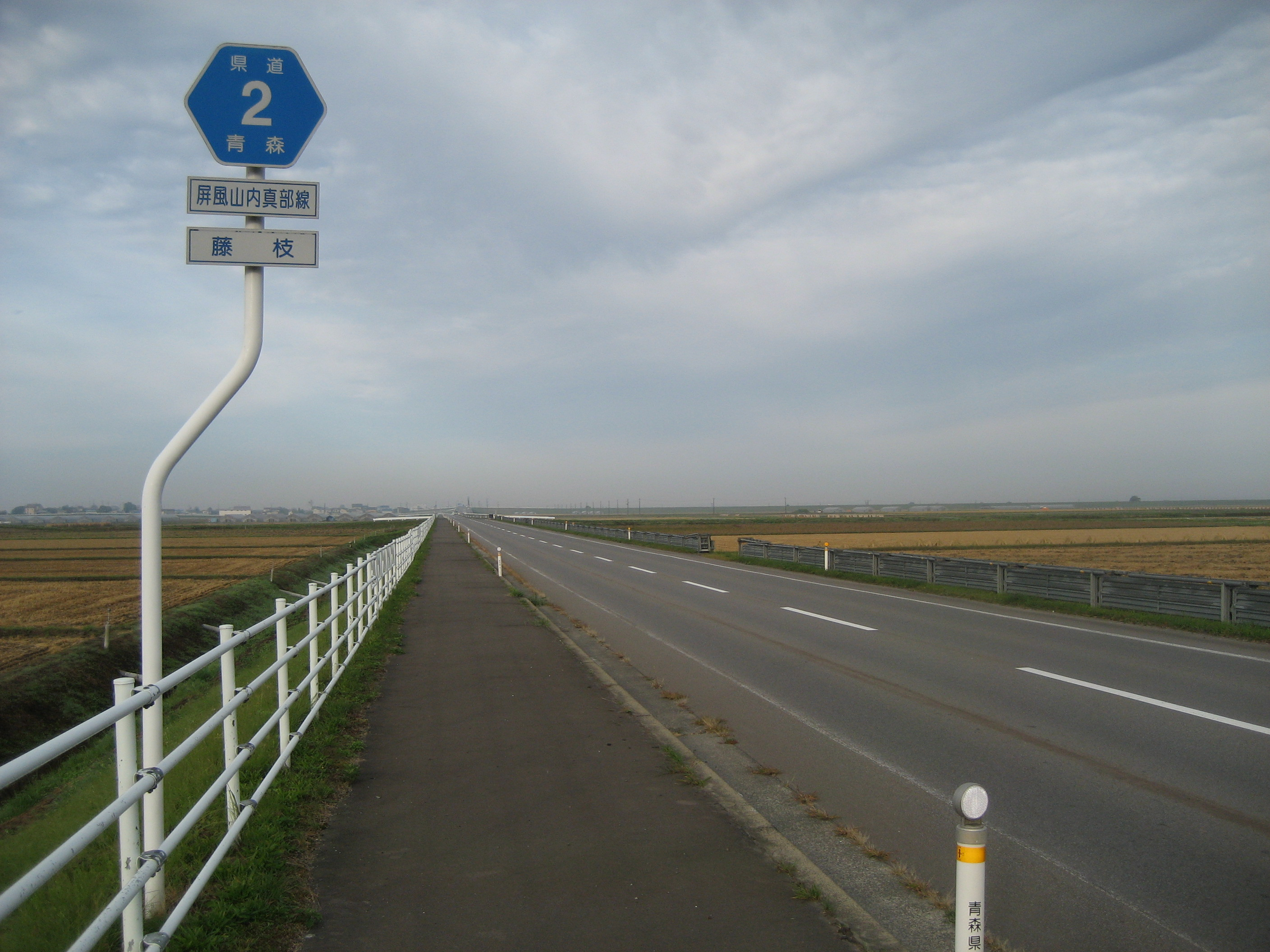 青森県道2号線五所川原市金木町藤枝付近